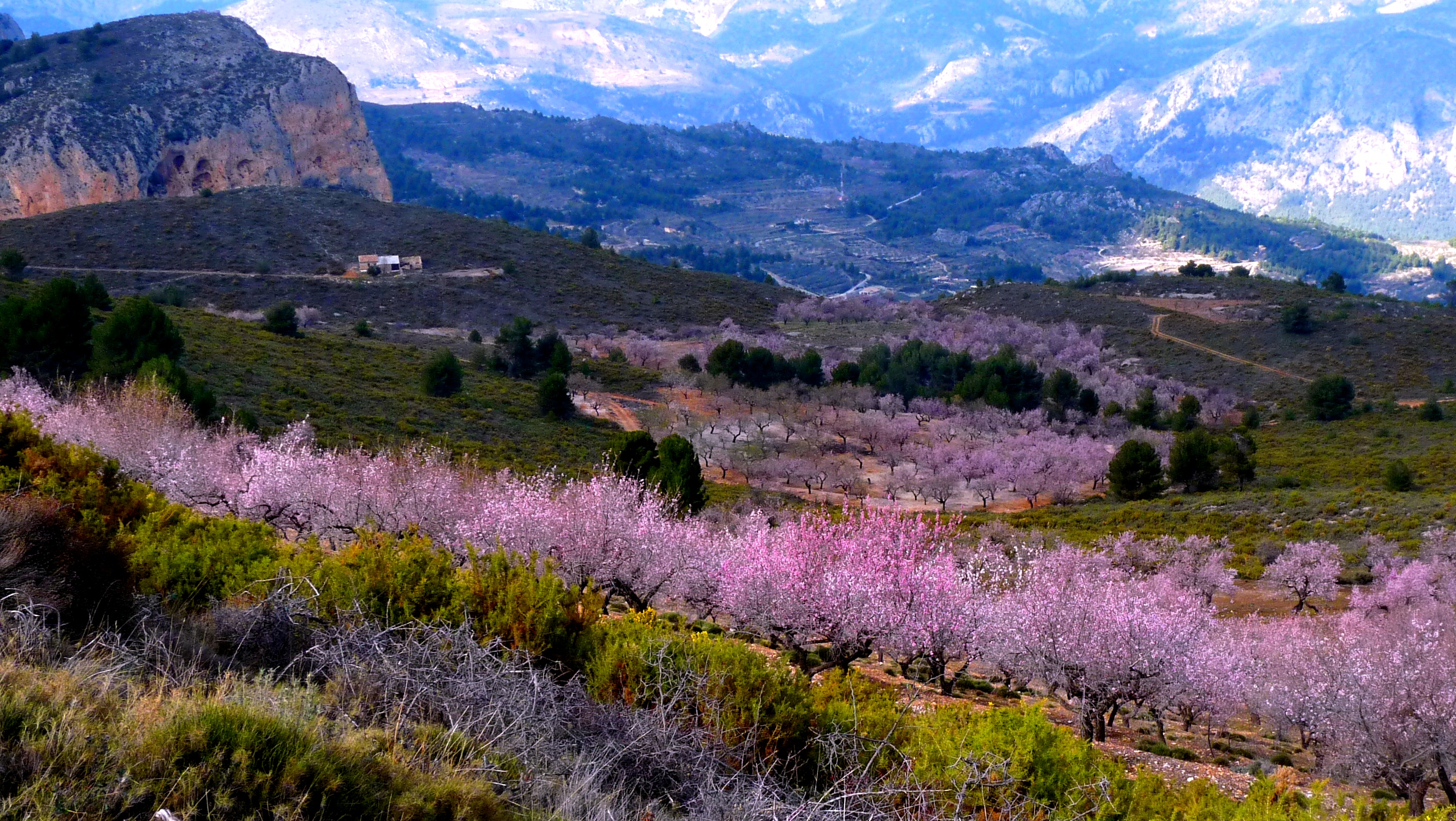 Sierra de Aitana (Alicante) España, febrero de 2012.